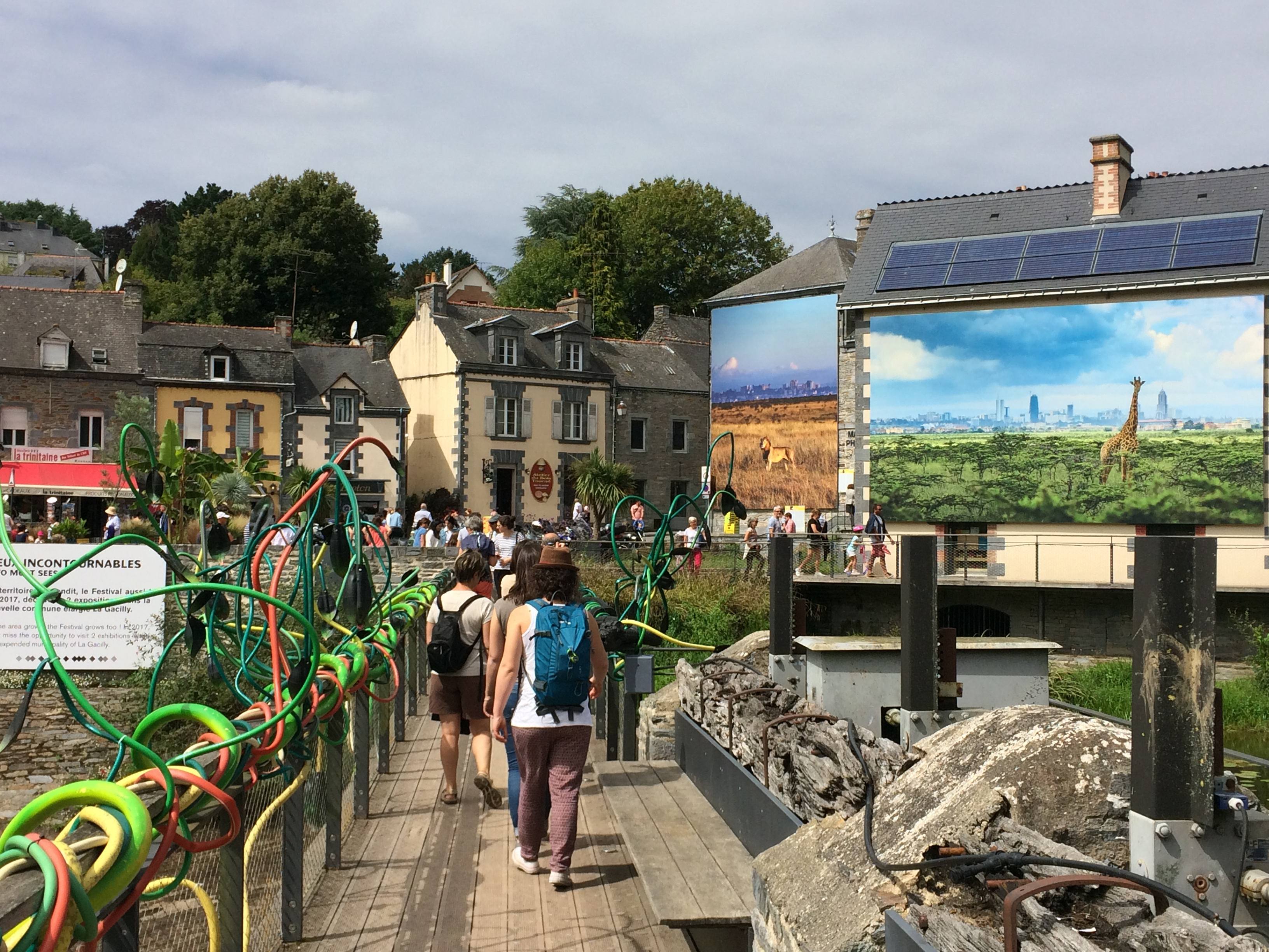 Festival Photographie La Gacilly 2017